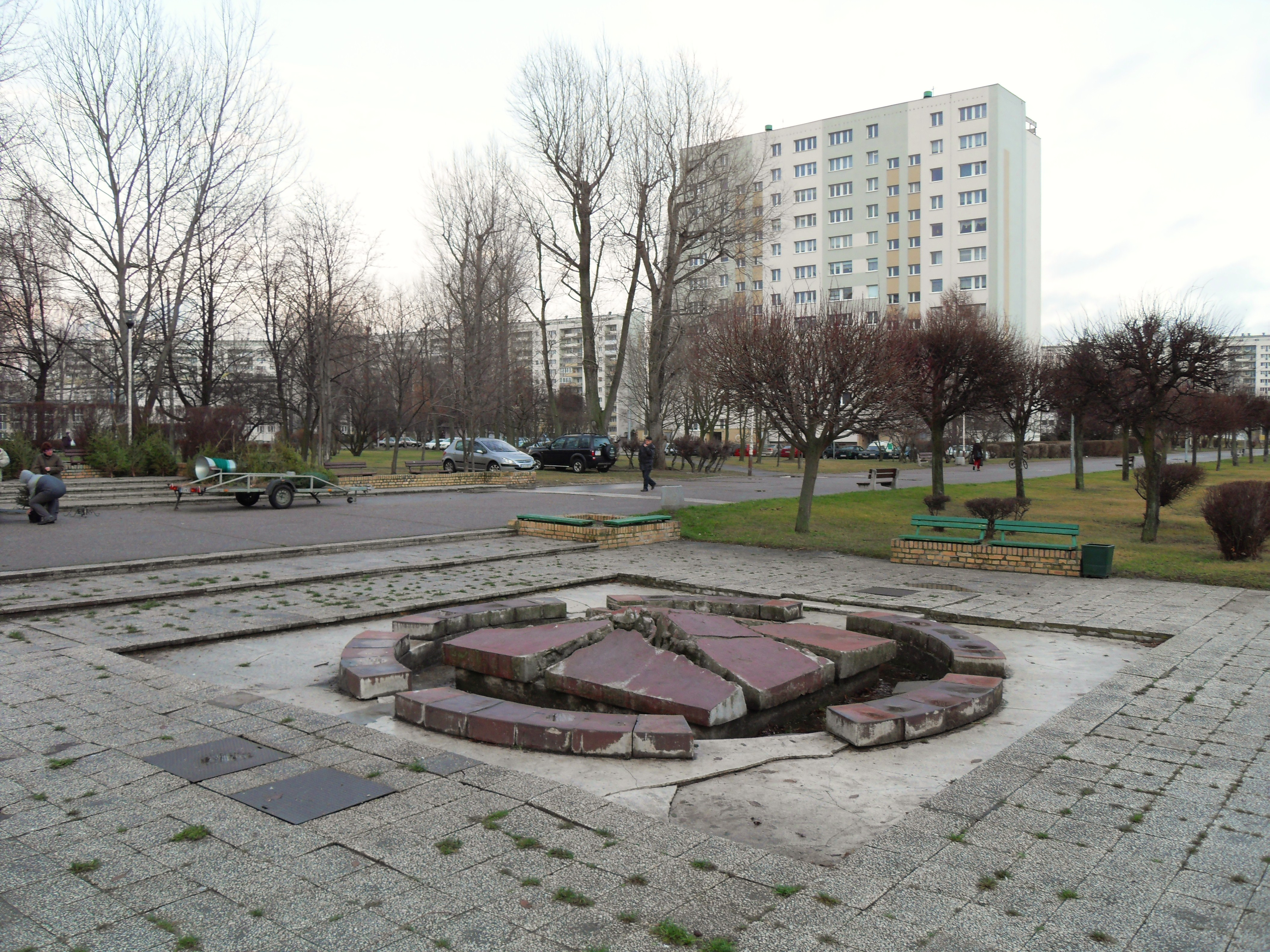 Gdańsk Żabianka, fontanna, autor: rzeźbiarz i ceramik Edward Roguszczak.